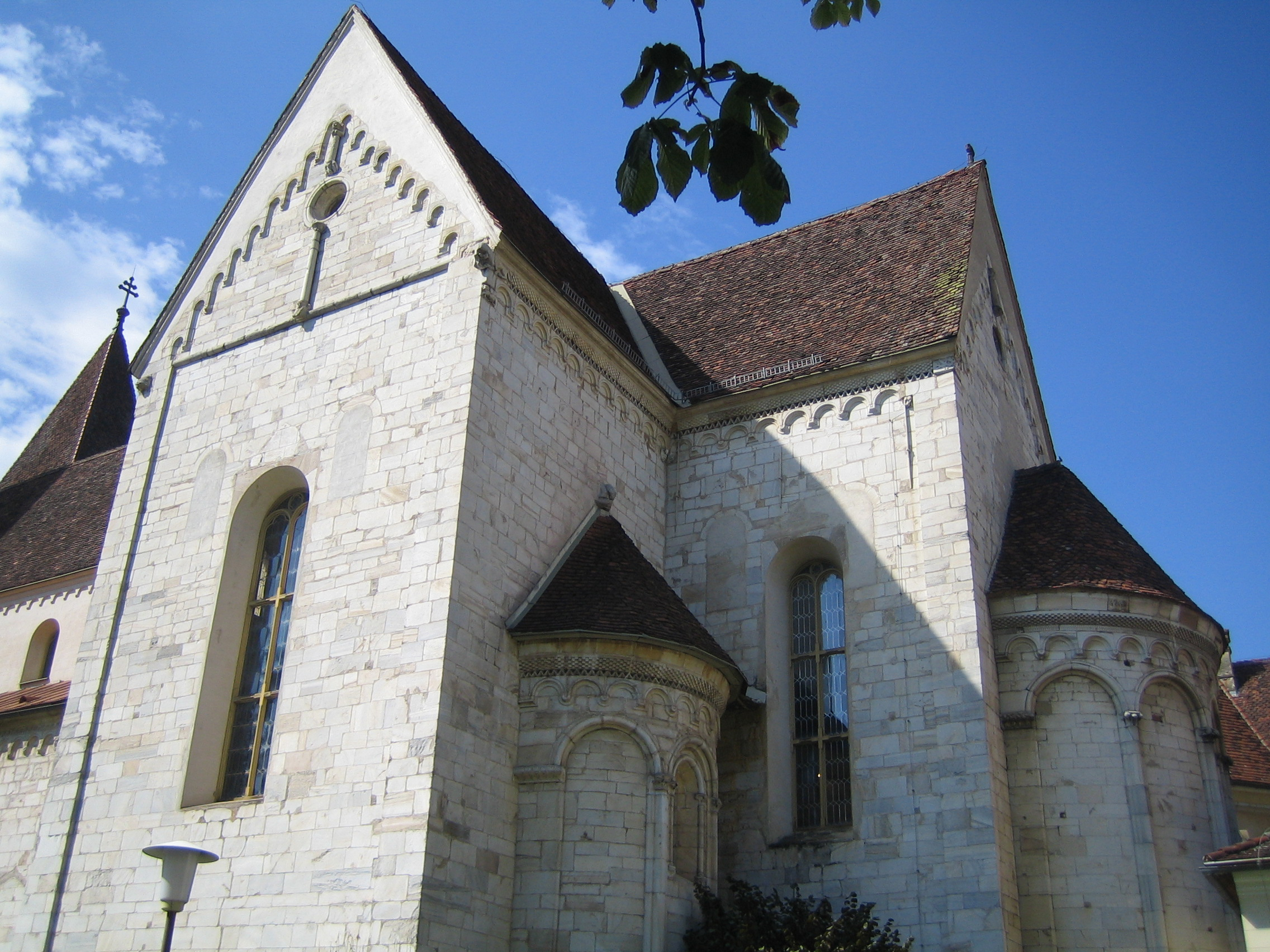 Stiftskirche St. Paul im Lavanttal: Südliches Querhaus sowie südliche und Hauptapsis.